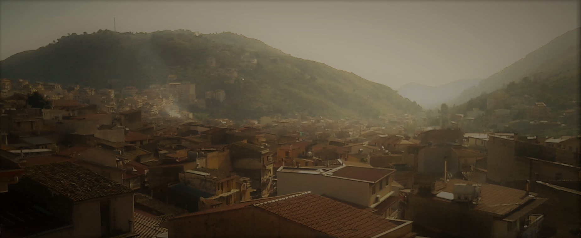 Tetti del centro di Belmomte Mezzagno